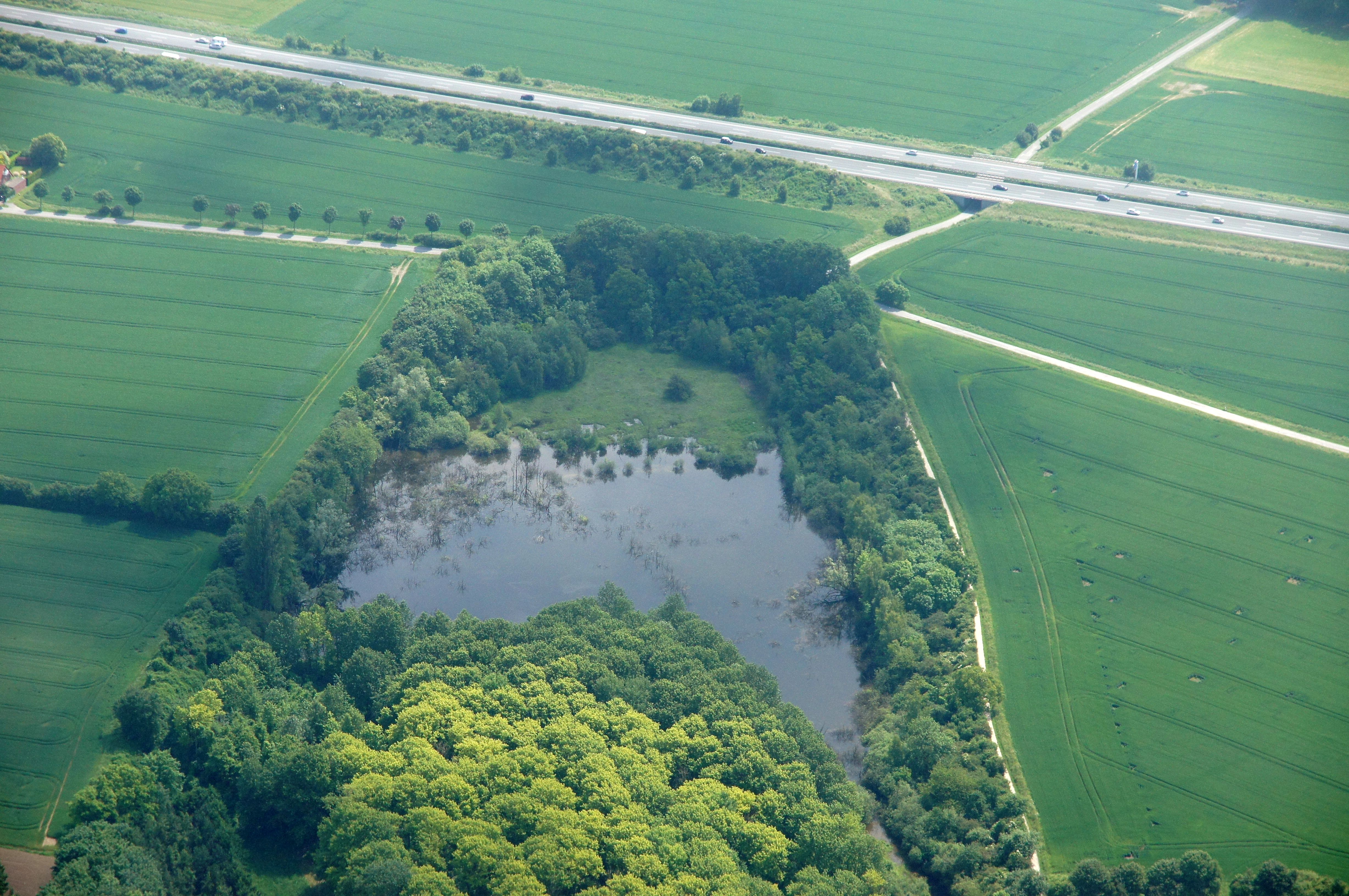 Naturschutzgebiet Steinbruch Vellern bei Beckum, Kreis Warendorf, NRW. Das Bild entstand während des Münsterland-Fotoflugs am 1. Juni 2014. Hinweis: Die Aufnahme wurde aus dem Flugzeug durch eine Glasscheibe hindurch fotografiert.